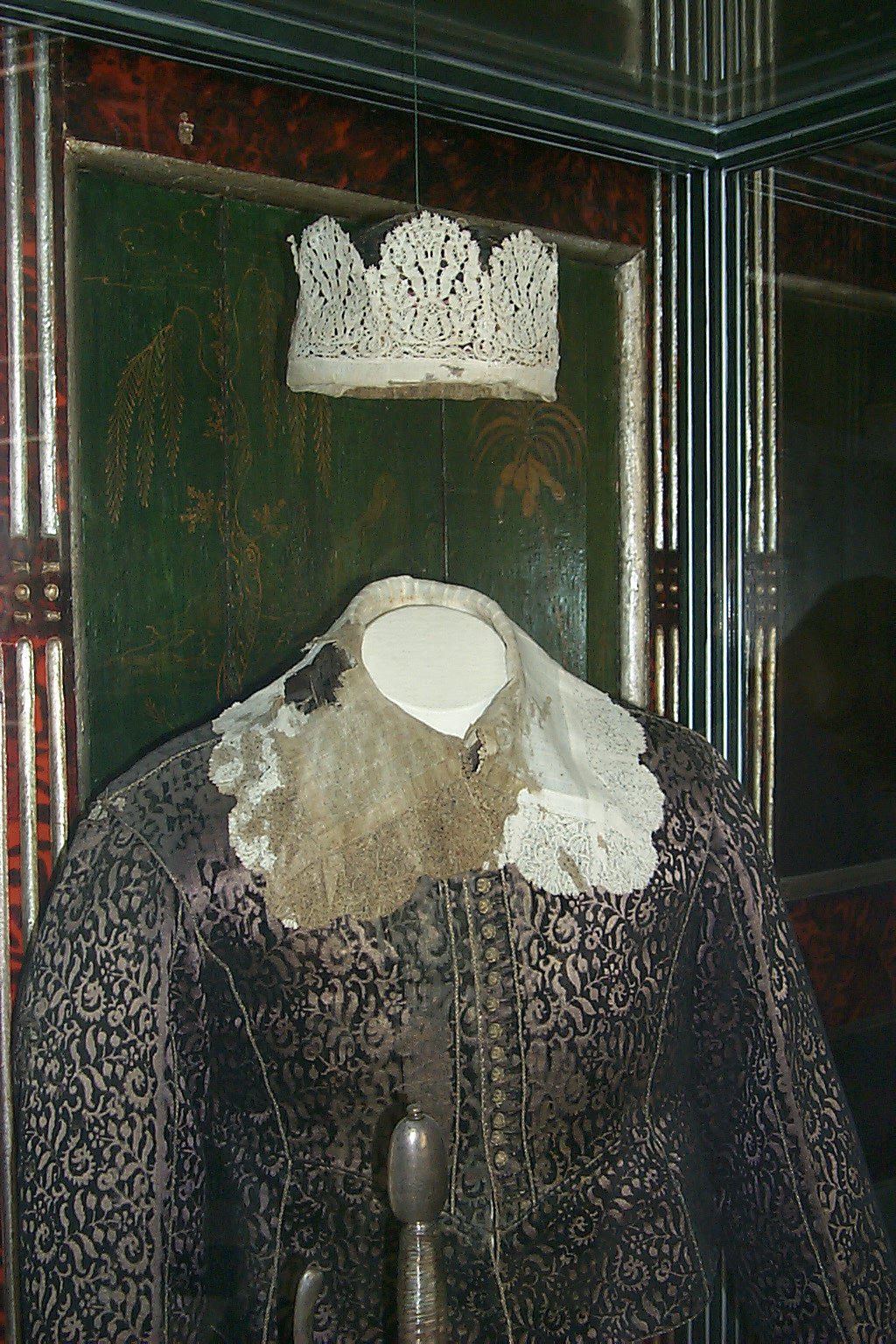 Christian IV's bloody clothes he wore at the battle in 1644.